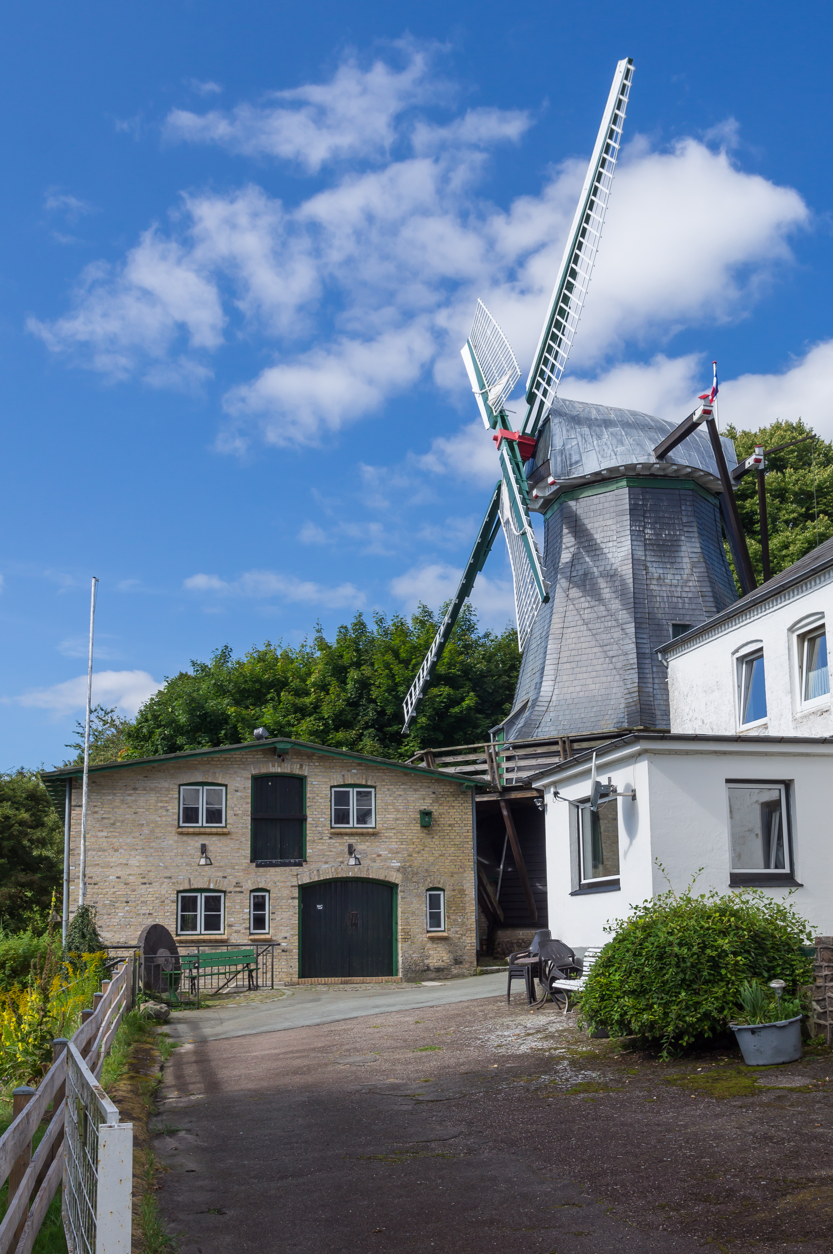 Flensburg-Nordstadt; An der Bergmühle 5; Bergmühle; Denkmal-Nr. 1